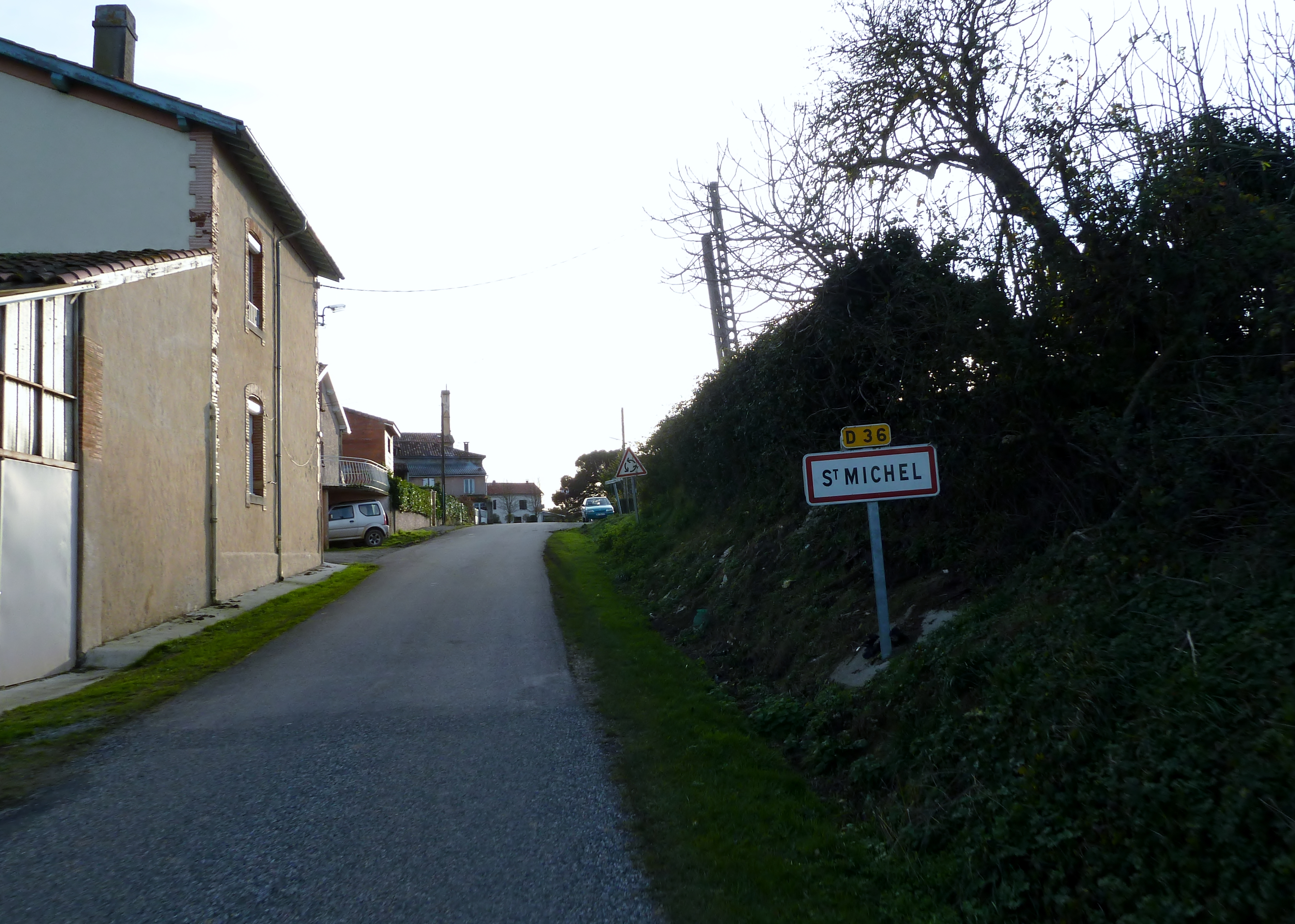 Entrée dans Saint-Michel (Haute-Garonne)